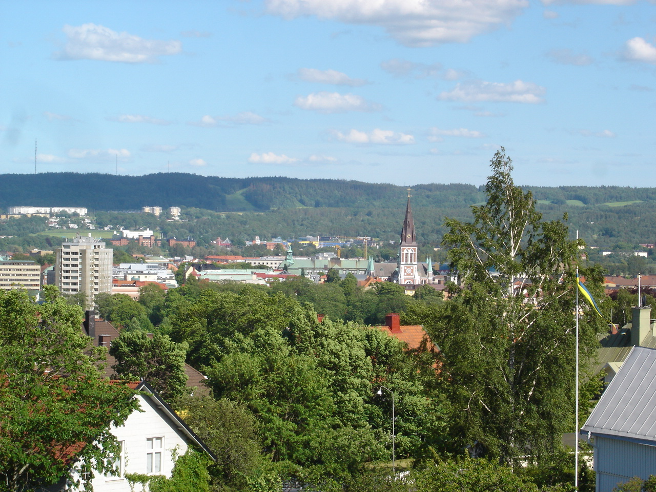 Ett naturklätt Jönköping